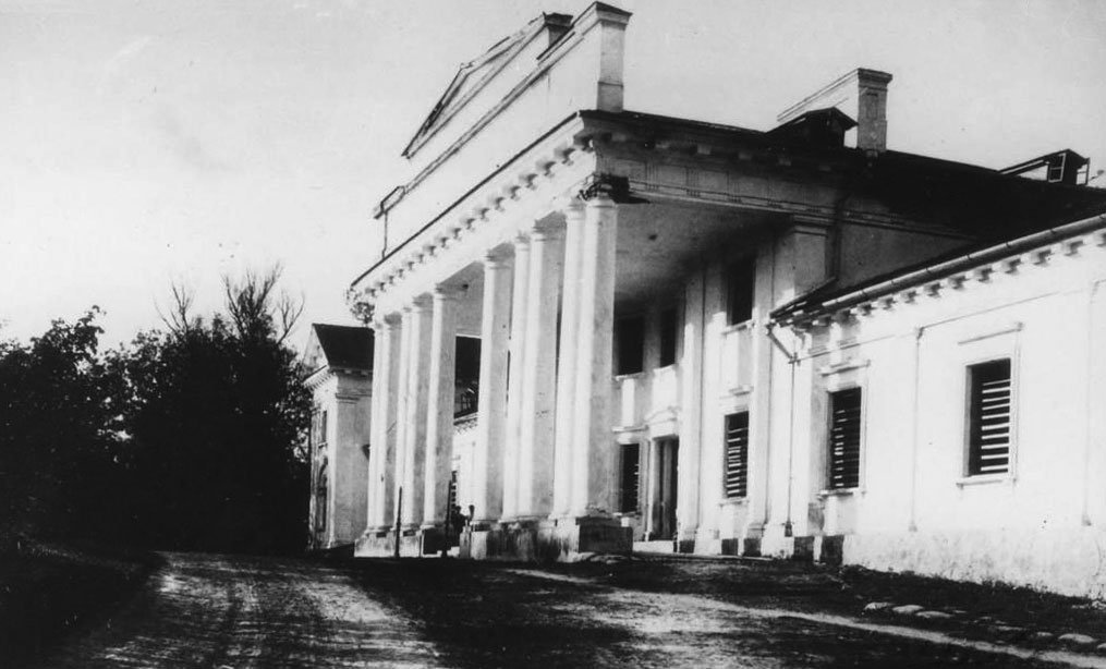 Беларуская (тарашкевіца): Лагойск (Łahojsk), палац Тышкевічаў (Tyškievič)